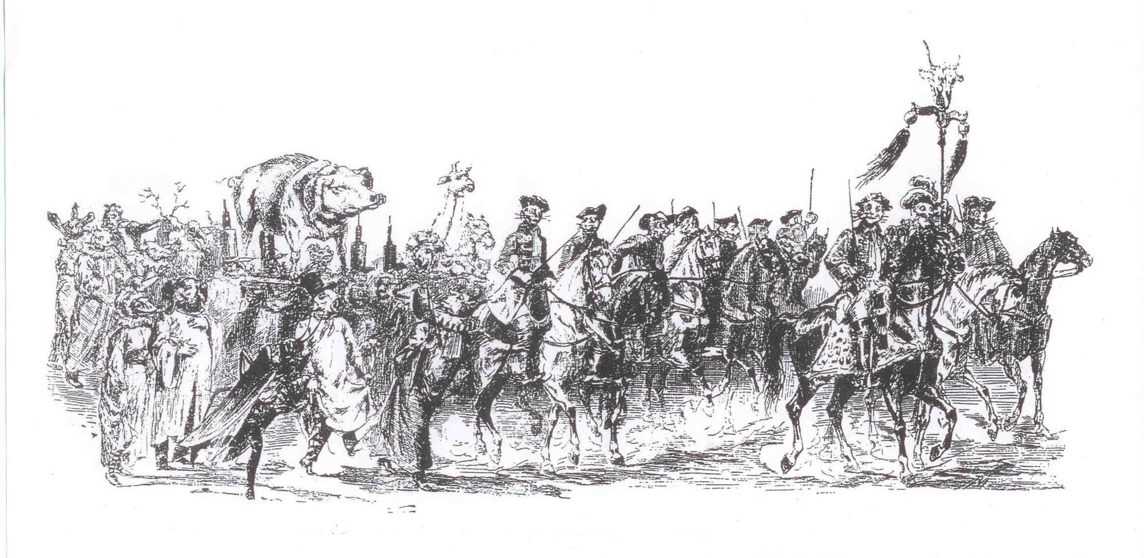 Les chats mousquetaires à cheval de l'école vétérinaire d'Alfort à la Mi-Carême 1894 à Paris.